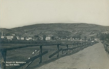 Изглед към Крумовград от моста над р. Крумовица.